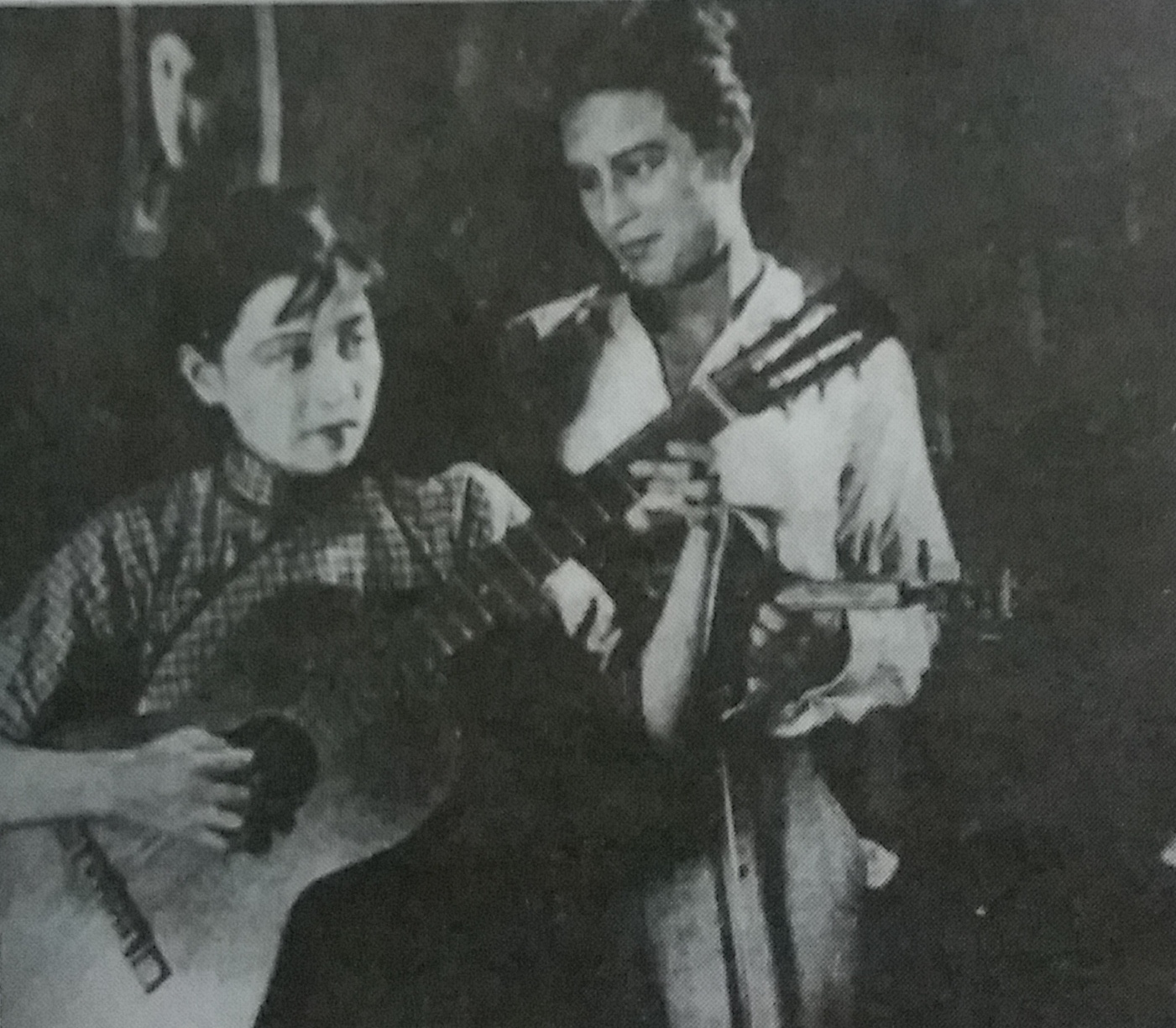 闲花野草剧照